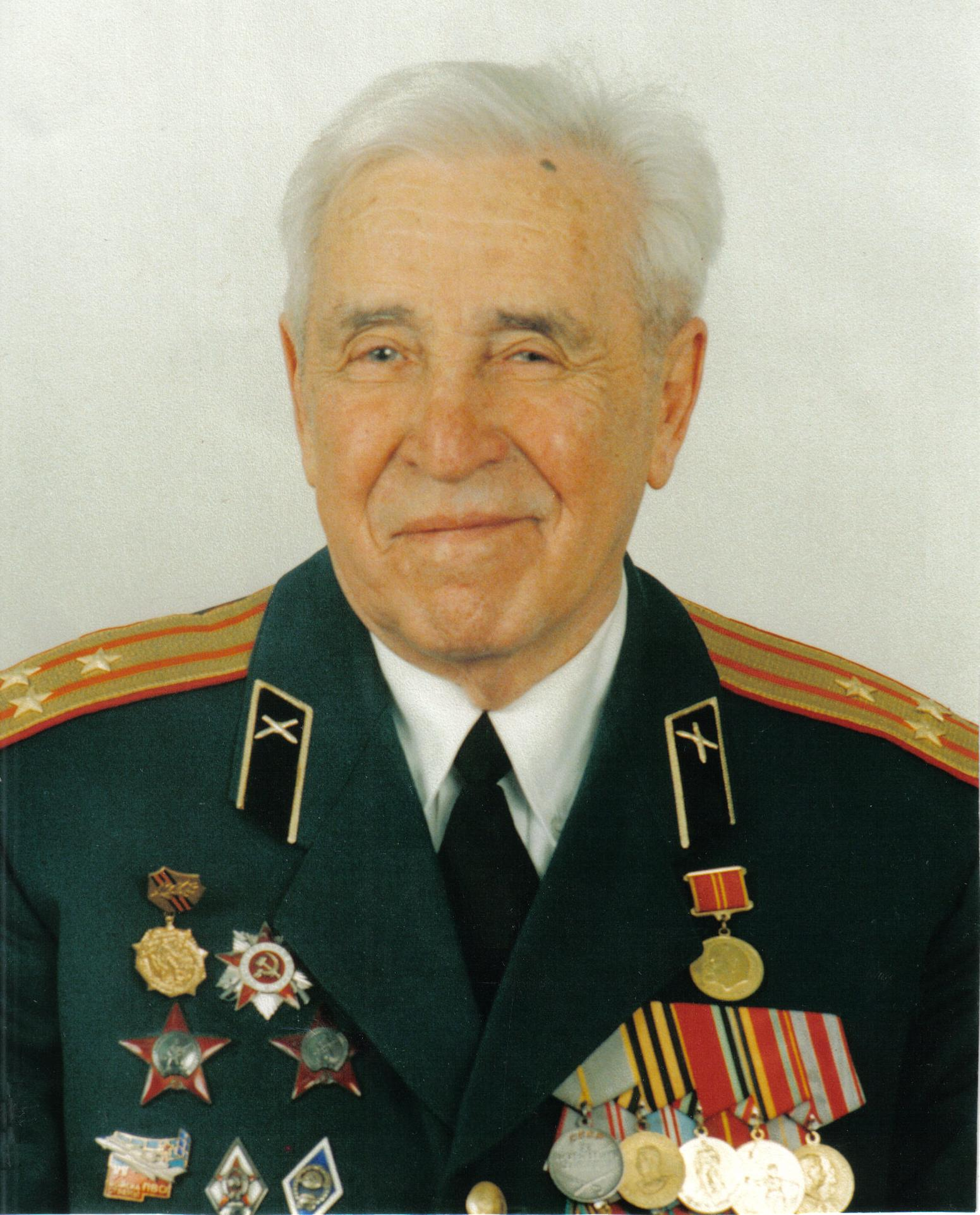 Шифрін Яків Соломонович